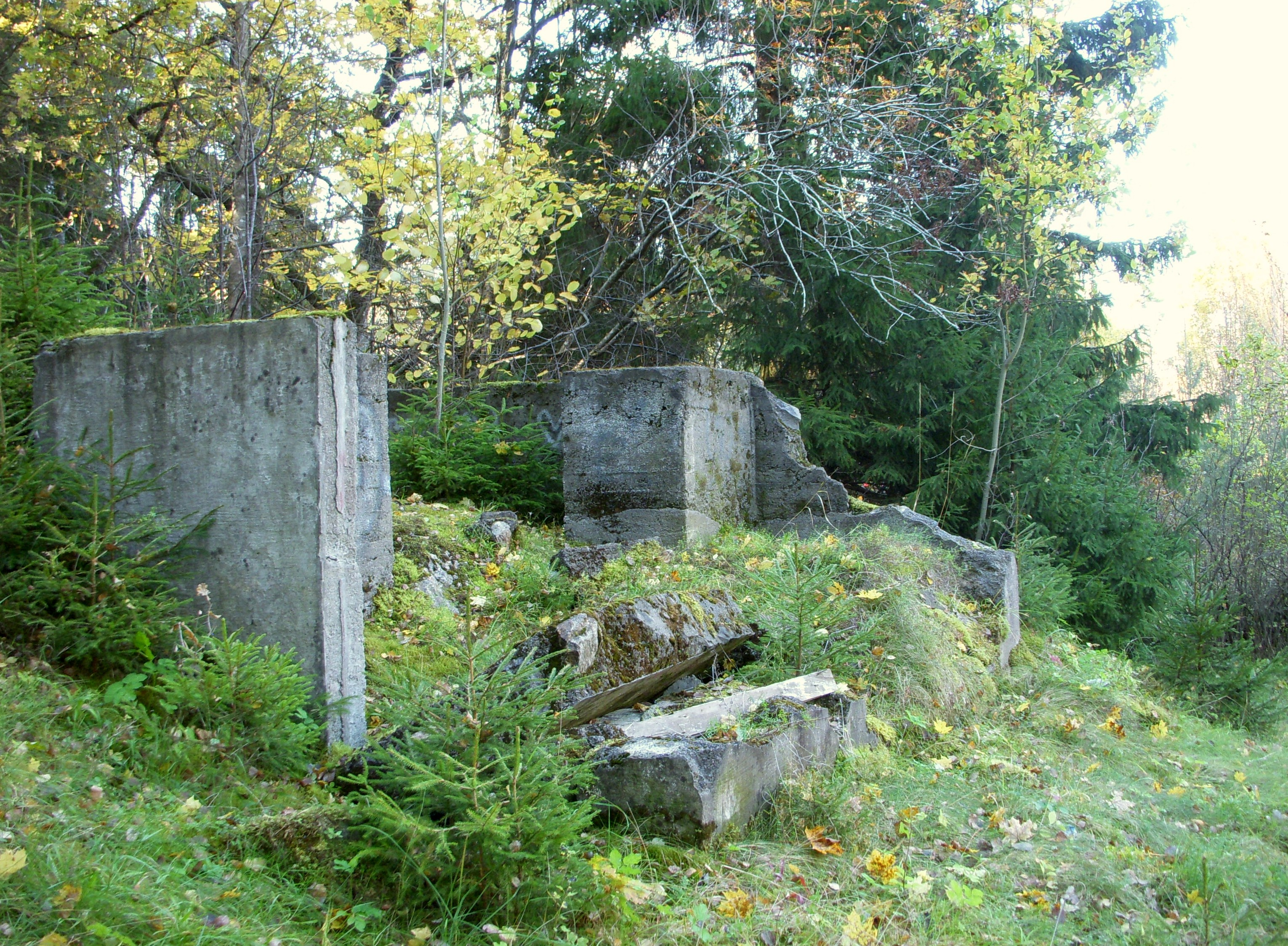 Det gamla sprängämnesförråd vid Snickarkrogen, Vårby